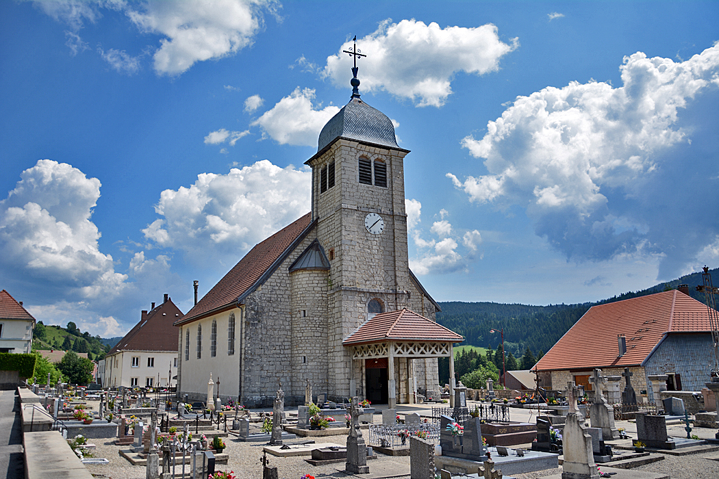 Pfarrkirche Saint-Pierre, Cluse-et-Mijoux, Doubs, Bourgogne-Franche-Comté, Frankreich